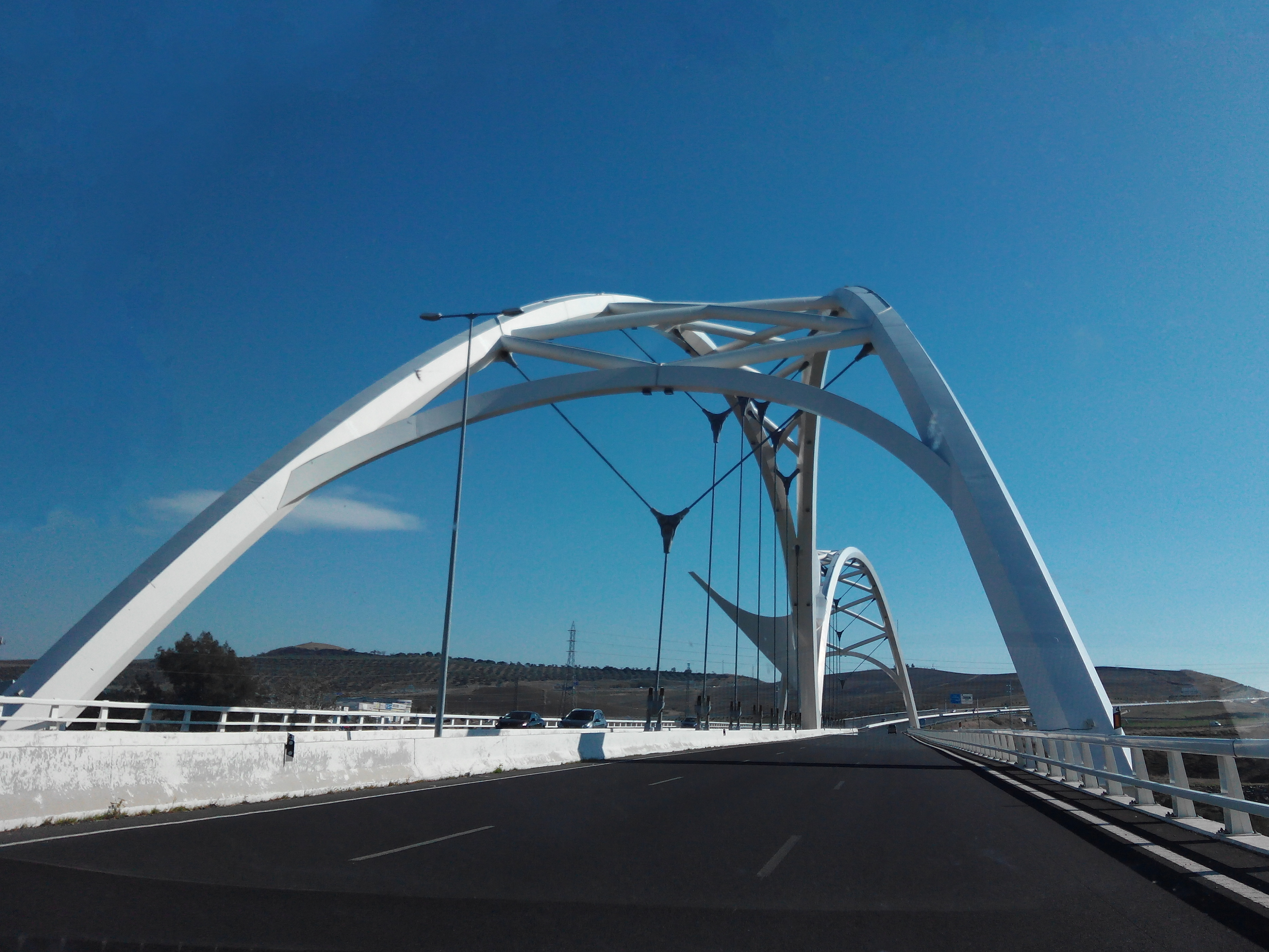 Puente de Abbas Ibn Firnas sobre el río Guadalquivir a suu paso por Córdoba (España).